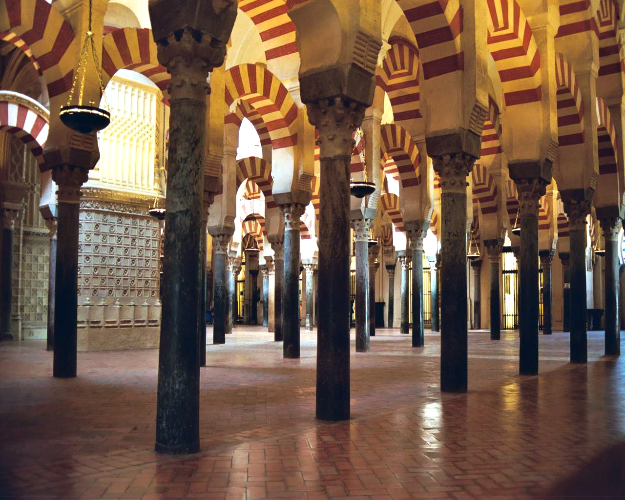 Mezquita of Cordoba